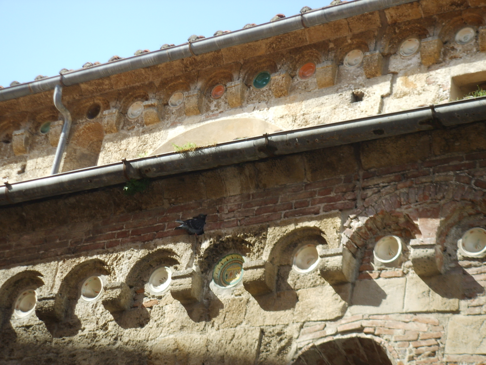 Sant'Andrea Forisportam bacini ceramici